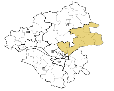 Carte de la cinquième circonscription de la Loire-Atlantique